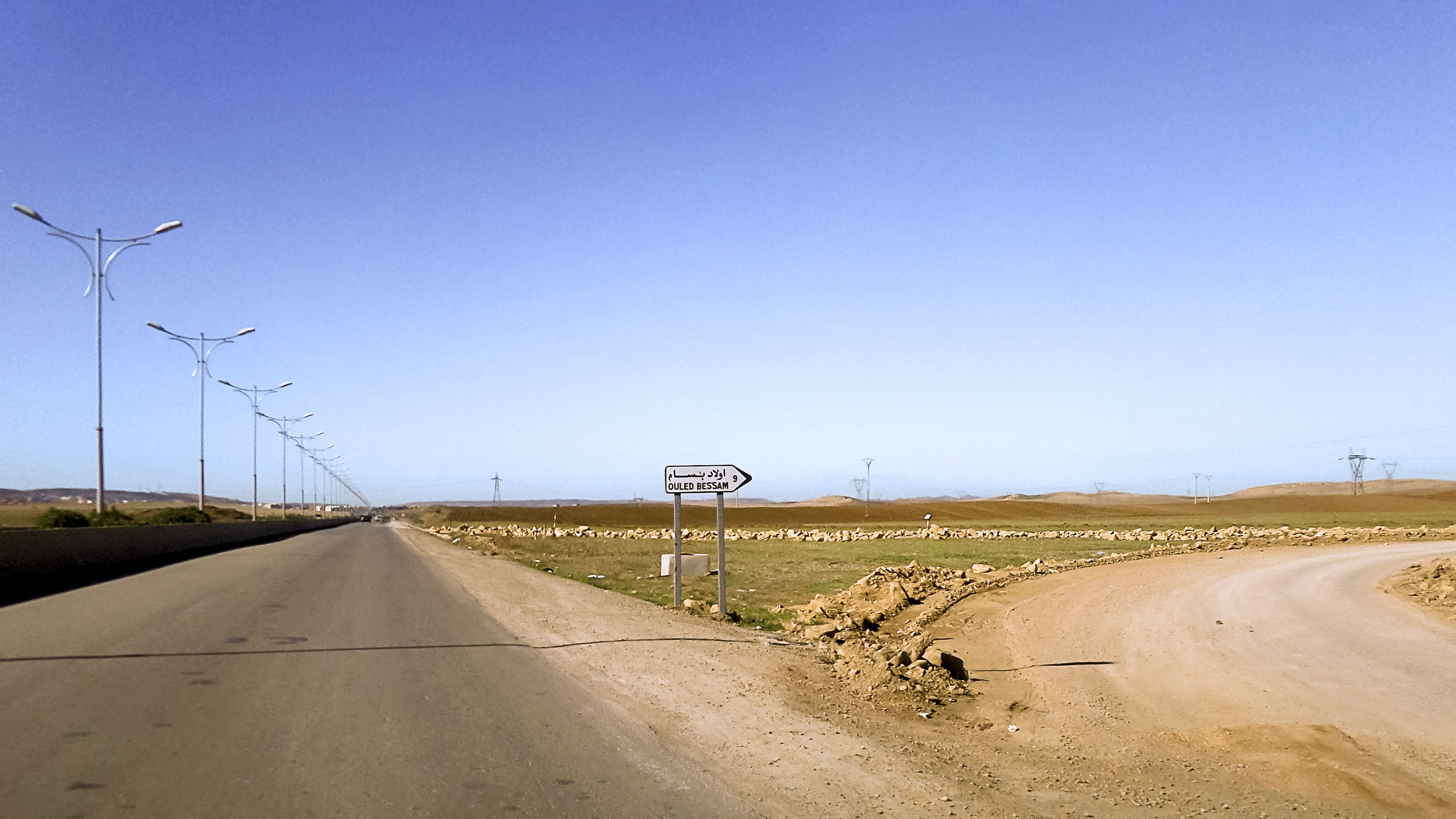 Tissemsilt تيسمسيلت